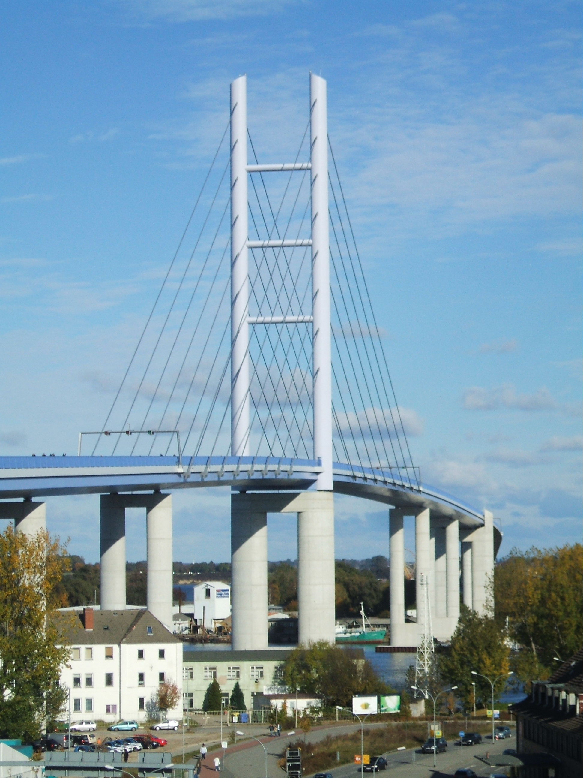 Rügenbrücke, Pylon